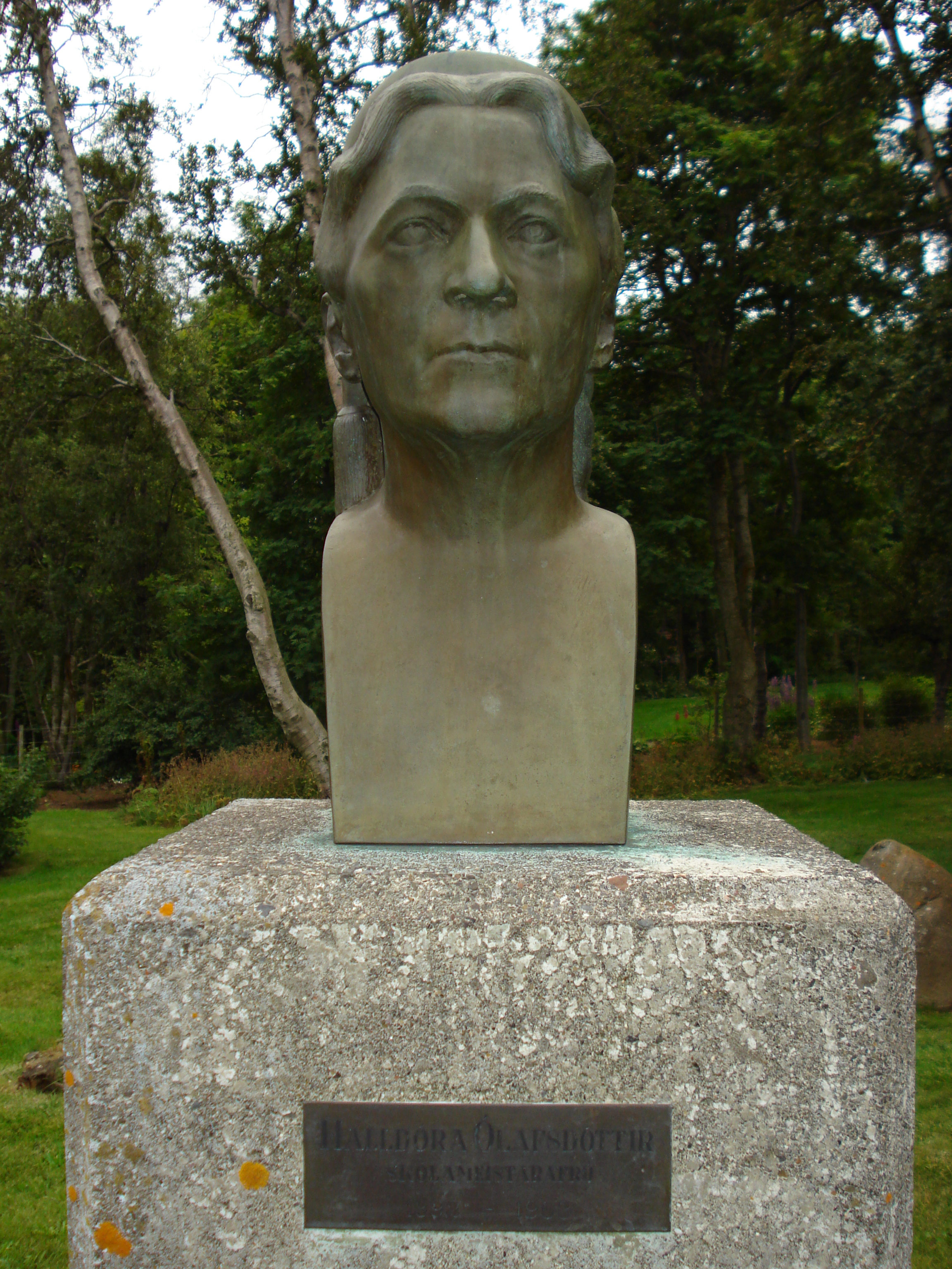 Halldóra Ólafsdóttir, headmaster in Akureyri